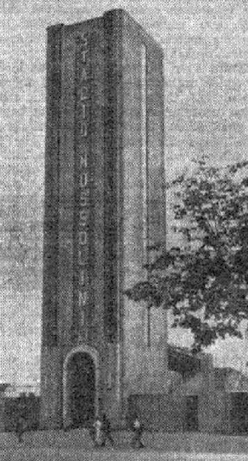 L'entrée du stade Bénito Mussolini de Turin en 1934.